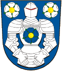 Znak obce Lazníky